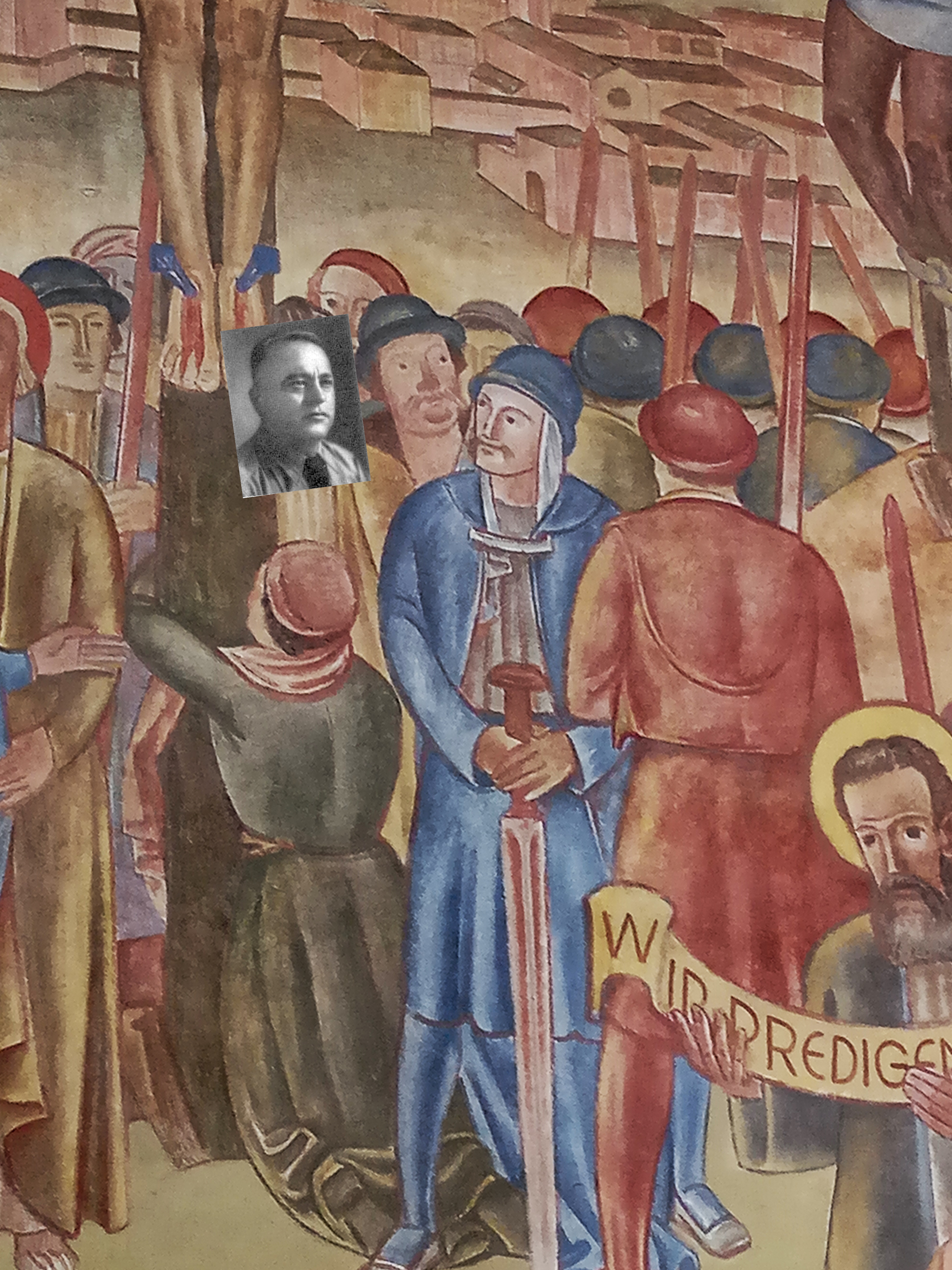 Ausschnitt aus dem Altargemälde von Paul Thalheimer, Ludwigskirche Bad Dürkheim, mit Kopf von Gauleiter Joseph Bürckel (mit Melone)